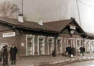 Верх-Нейвинск старый вокзал